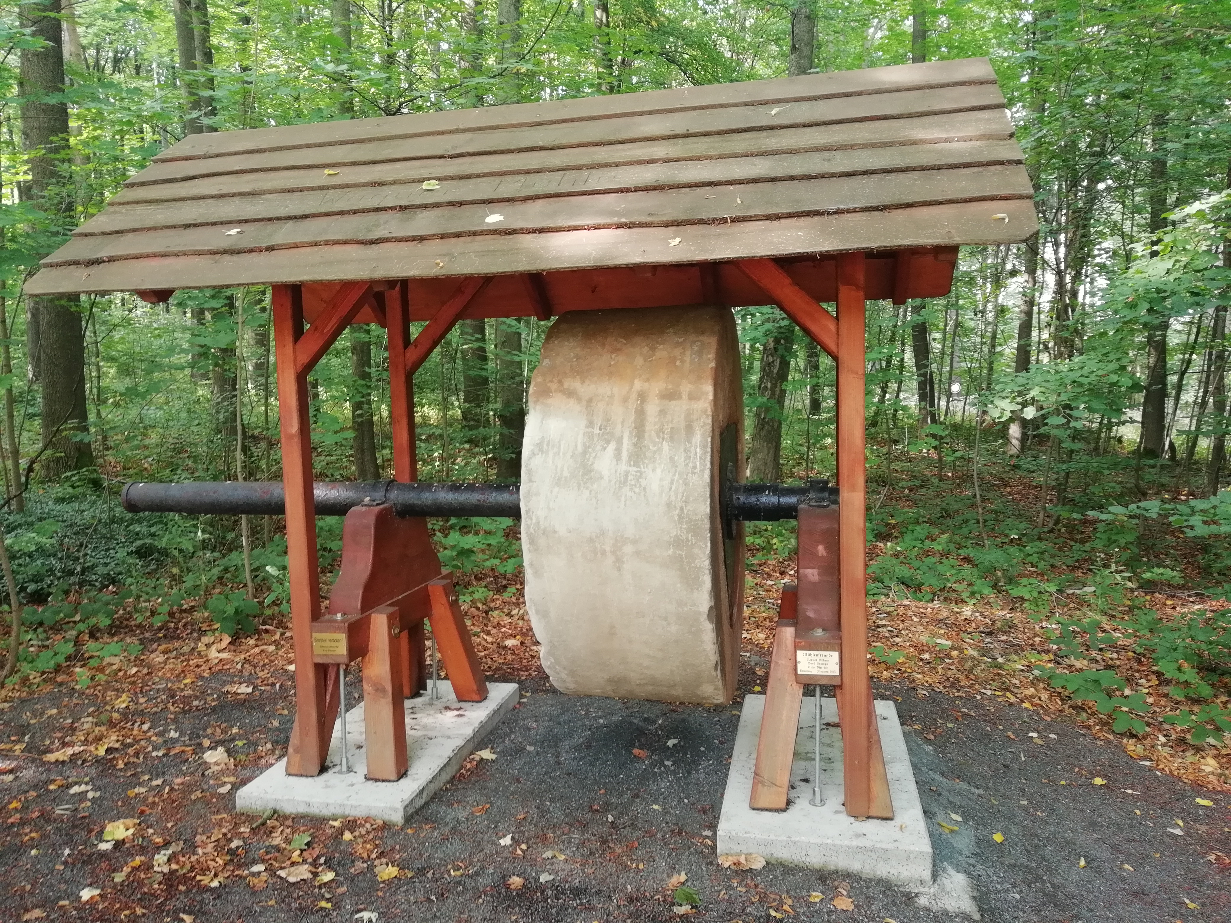 Geborgener Schleifstein der abgebrochenen Wagnermühle an der Sitzgruppe Steinbrückmühle, Talsperre Lehnmühle, Gemeinde Hartmannsdorf-Reichenau, Sachsen